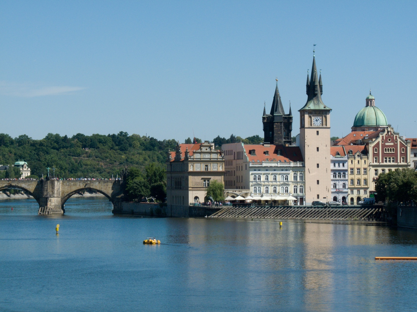 Karlův most